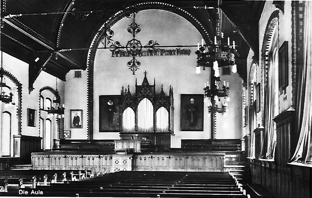 400-Jahr-Feier. Aula des Katharineums zu Lübeck. 1531-1931